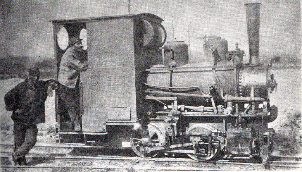 Locomotive DECAUVILLE, probablement de construction Borsig 0-2-0 T "Alsace", réquisitionnée en 1915 par l'Armée Française.